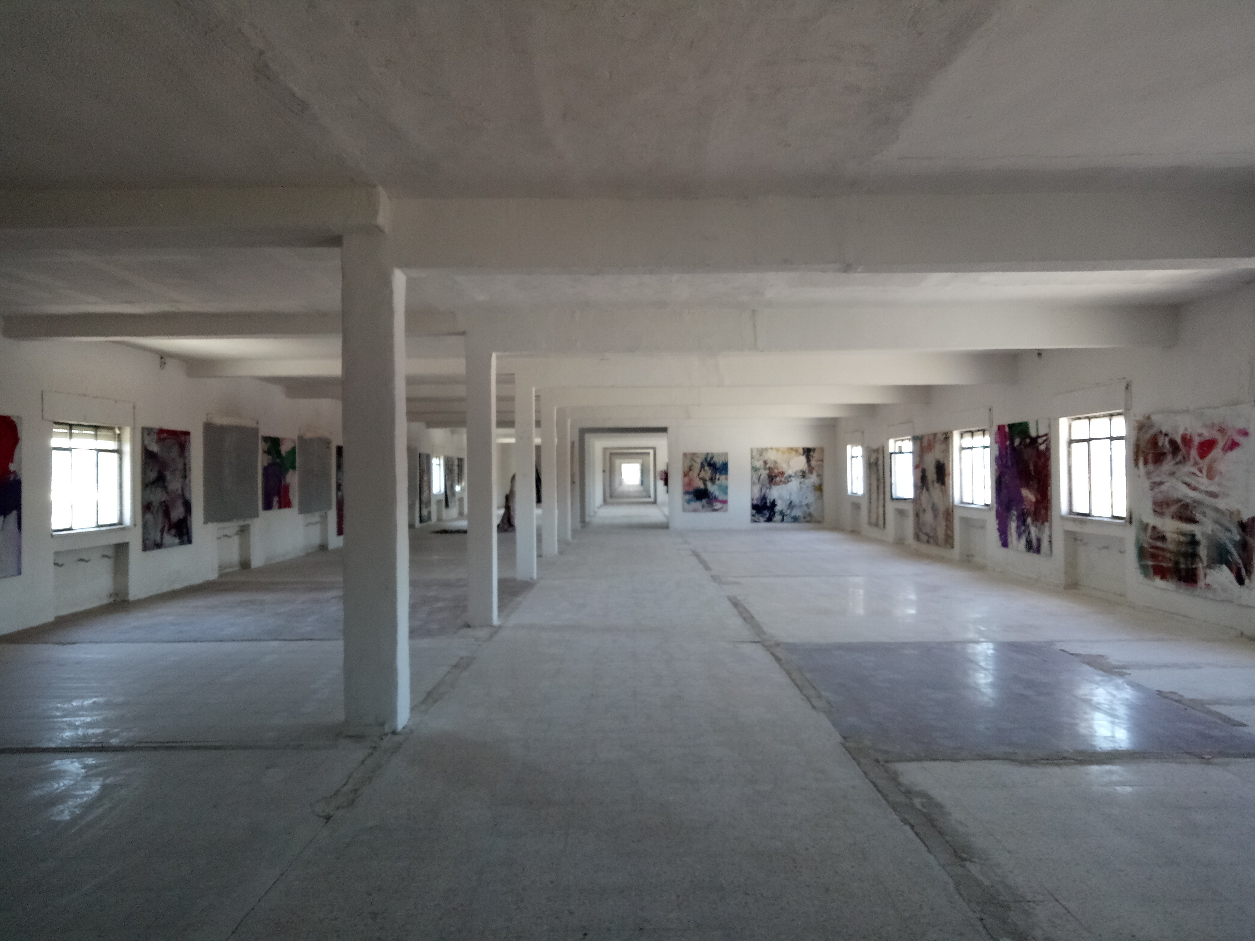 Museo con colección permanente, exposiciones temporales, talleres de artistas, galerías y LABs.